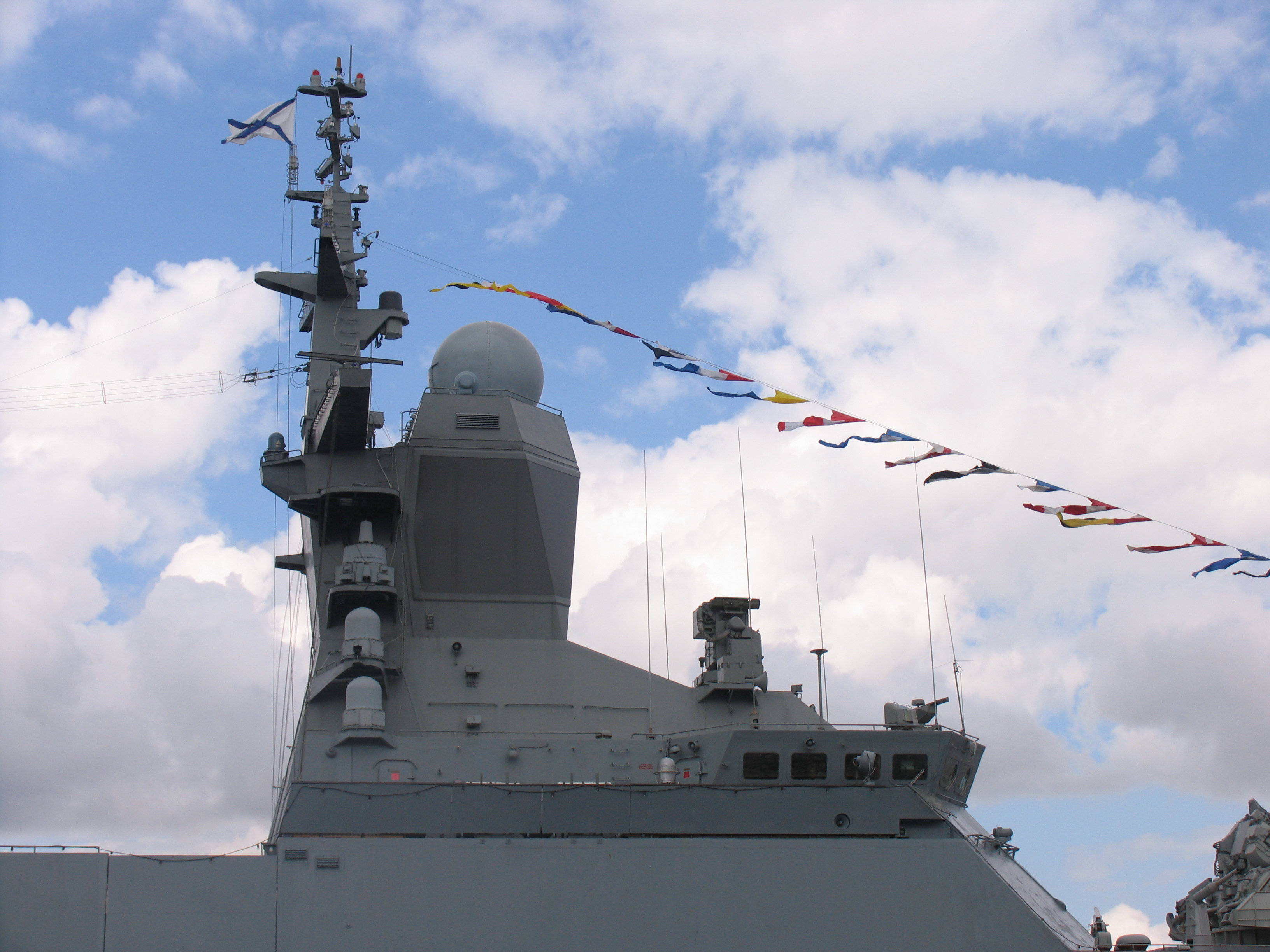 "Стерегущий" на Дне ВМФ в Санкт-Петербурге, 2011 год. Передняя мачта.